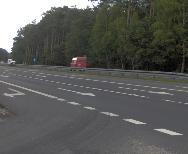 Obwodnica Goleniowa (droga krajowa nr 3). Autor: Maks Saczywko (Soczewa)